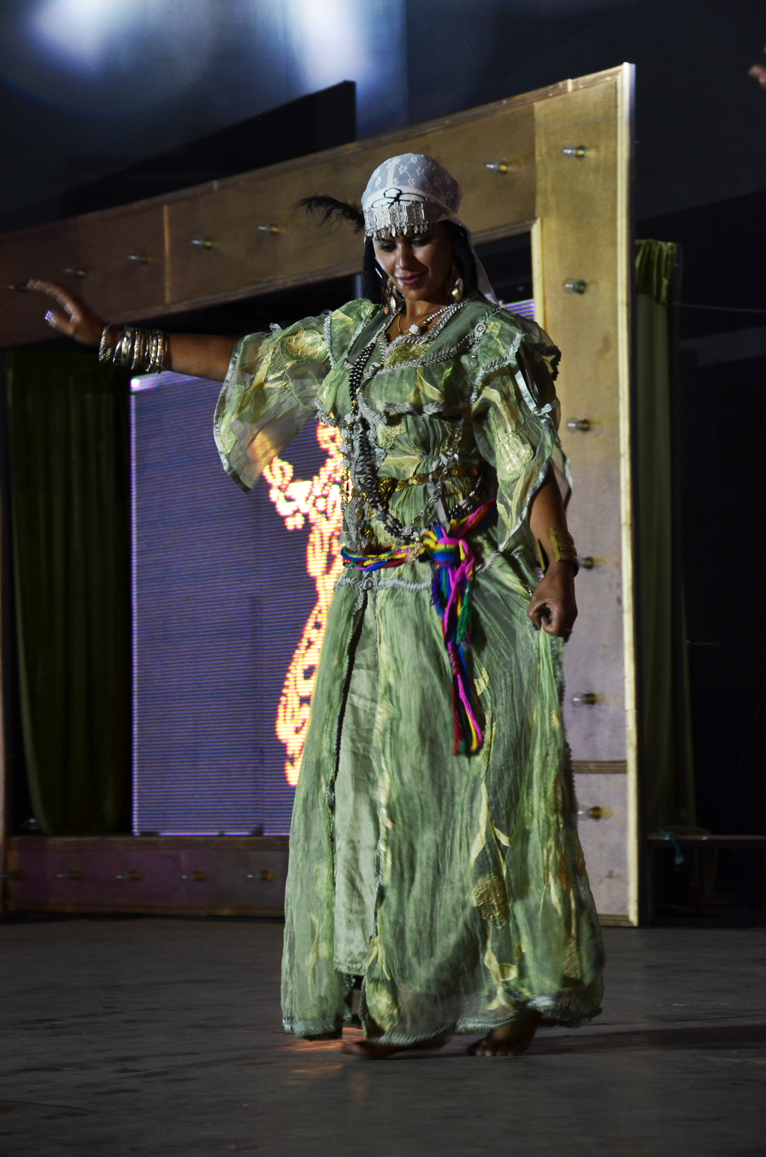 danseuse chaoui au festival de la danse populaire 2015 Sidi Bel Abbes This is an image from Algeria